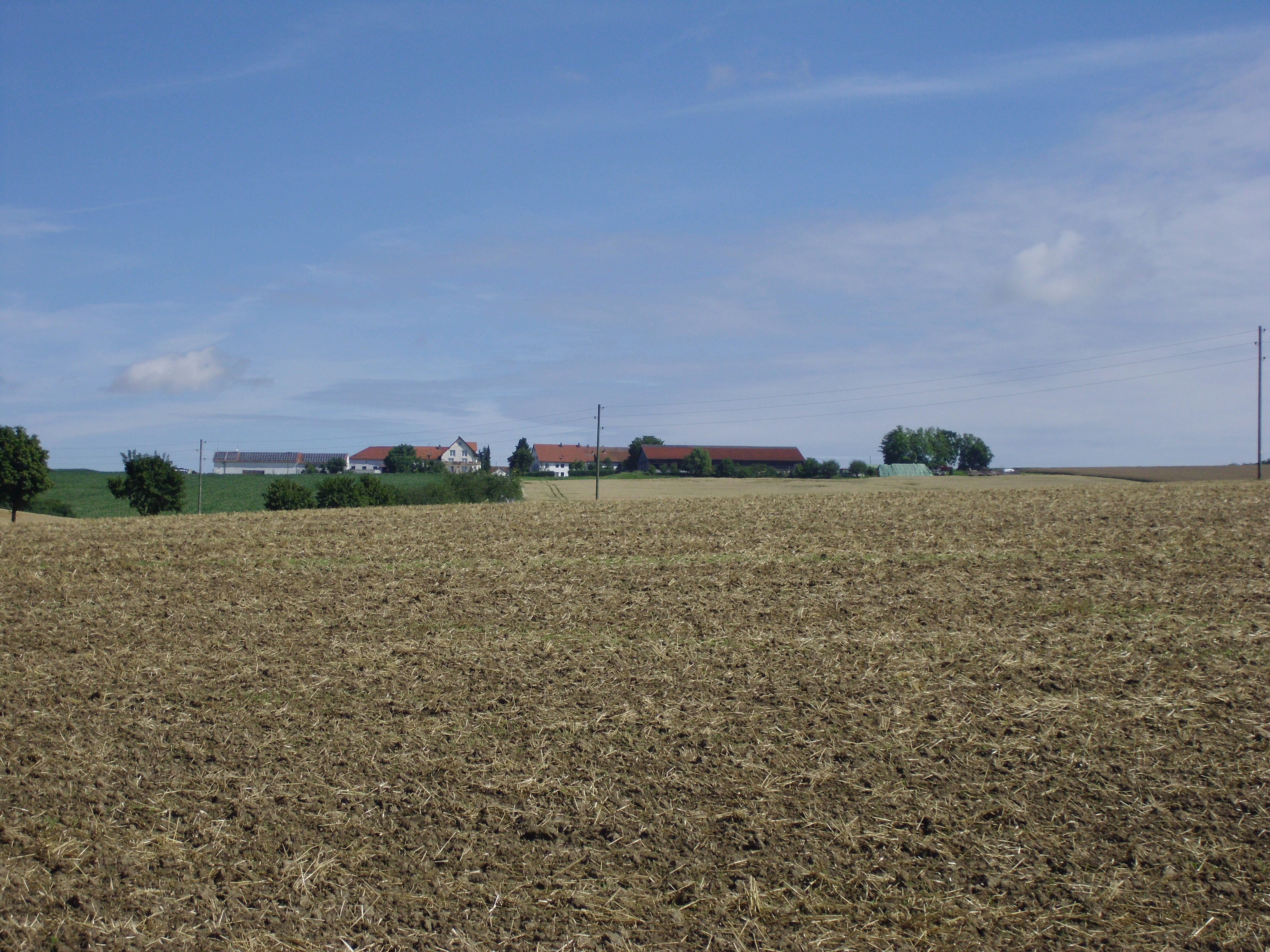 Asbrunn, Gemeindeteil von Rennertshofen im Landkreis Neuburg-Schrobenhausen